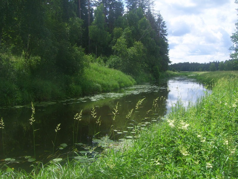 Jaros upė Anykščių raj., ties Jotkonimis